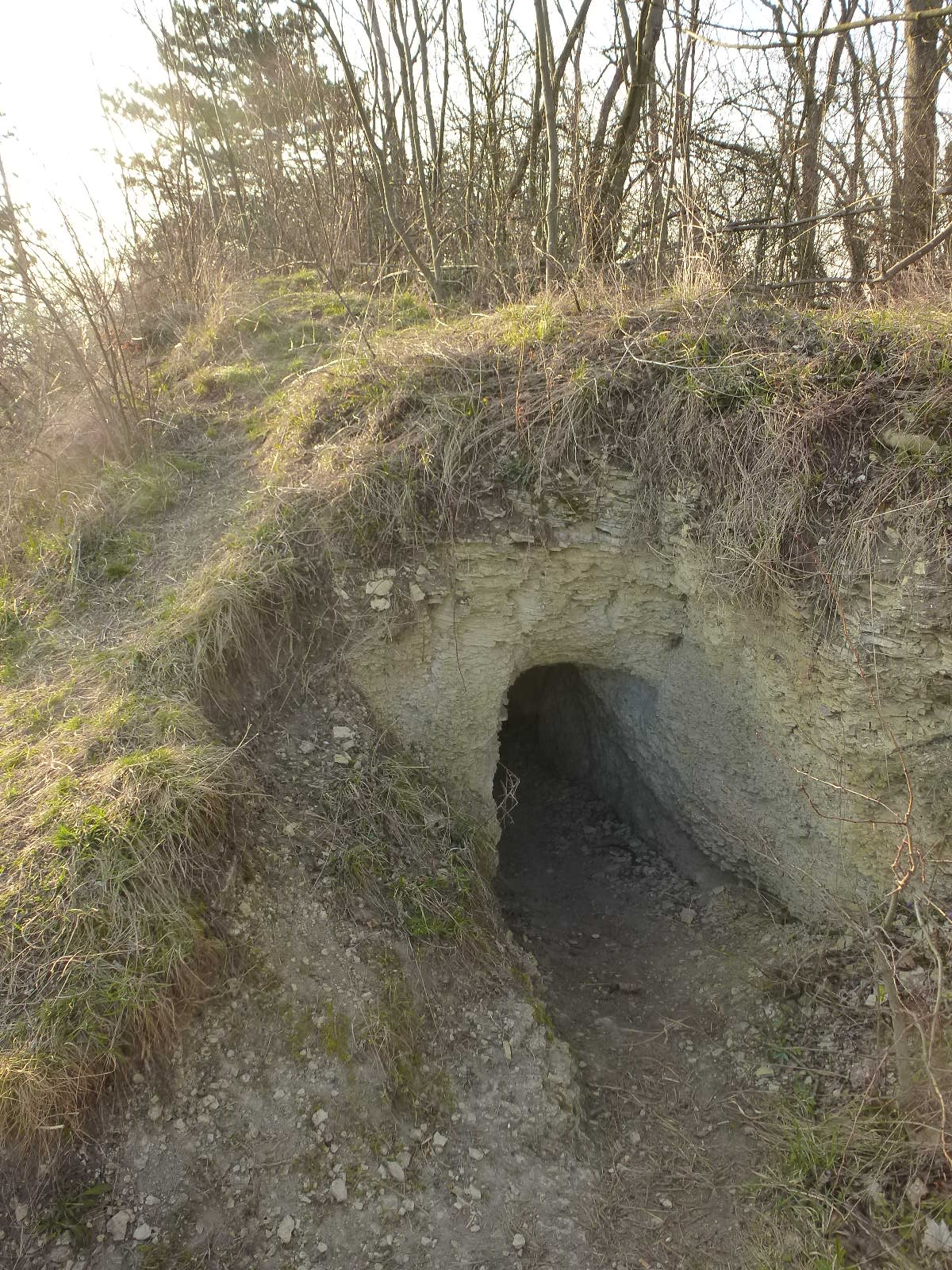 eins von den Überresten der alten königlichen Burg Kirchberg auf dem Hausberg bei Jena